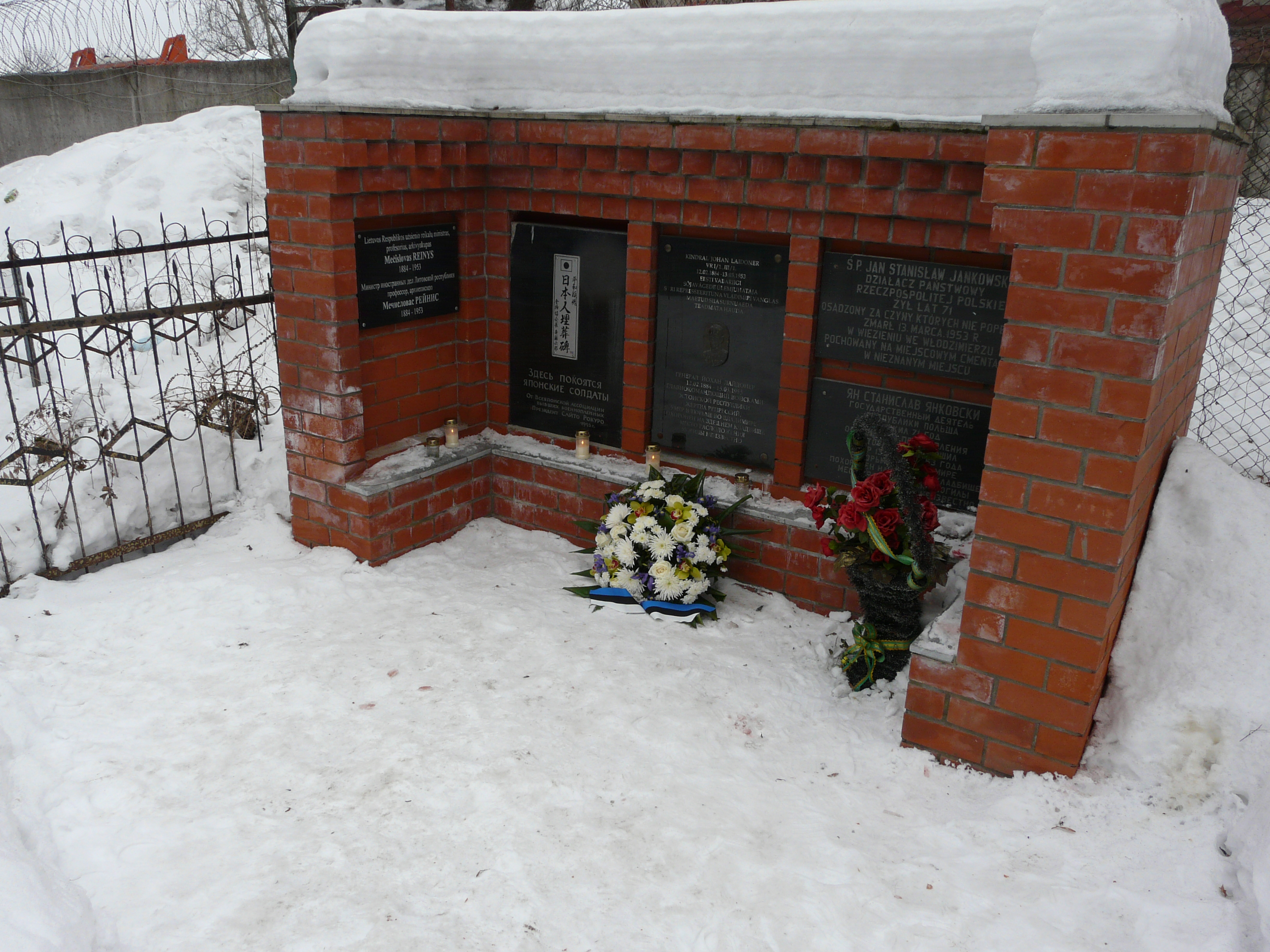 Kindral Johan Laidoneri mälestustahvel Vladimiri Knjaz-Vladimirskoje kalmistul